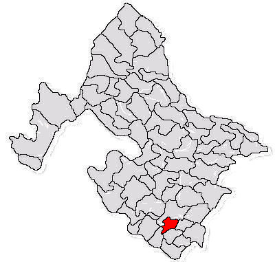 Categorie:Hărţi ale judeţului Mehedinţi